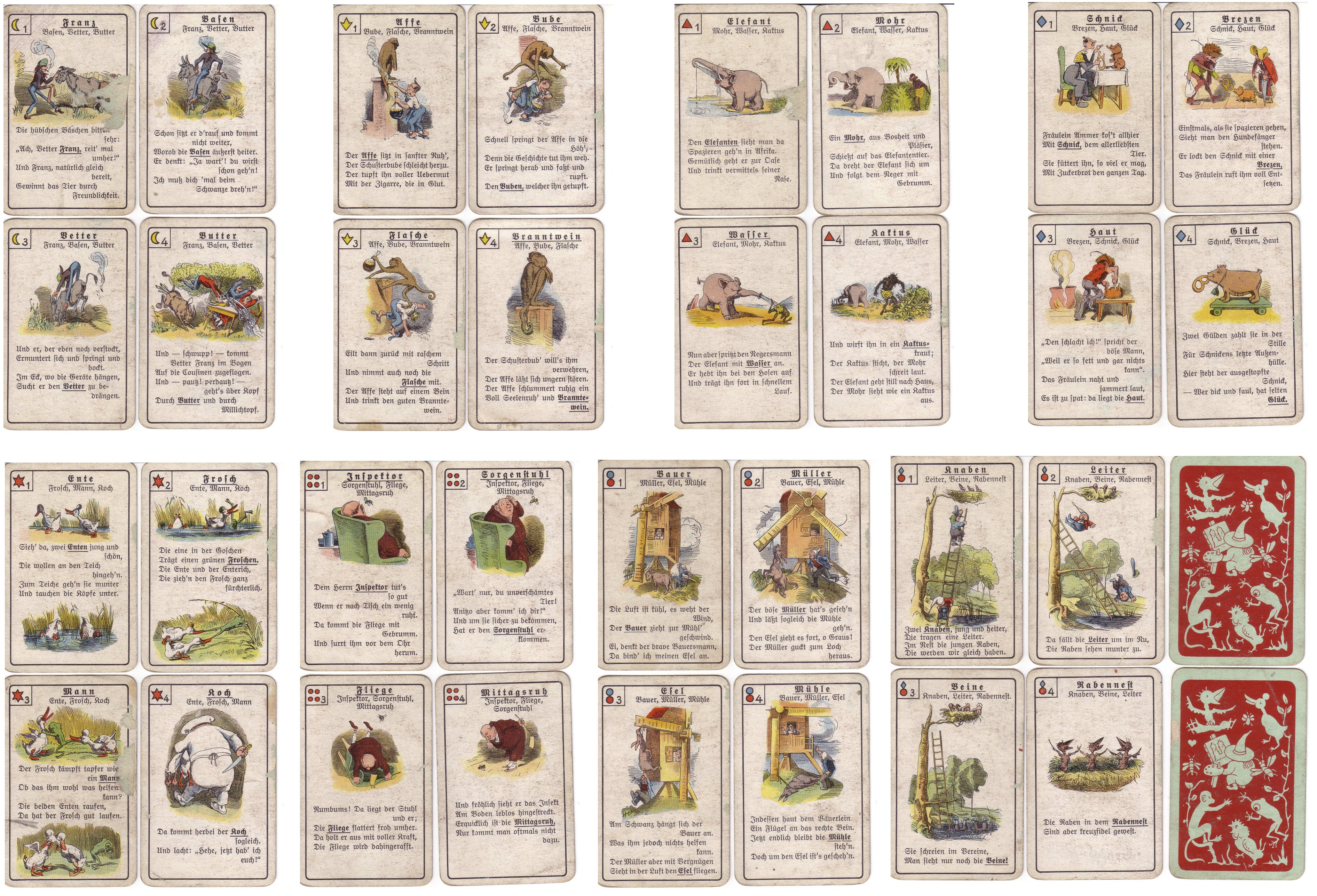 Quartettspiel Wilhem Busch.